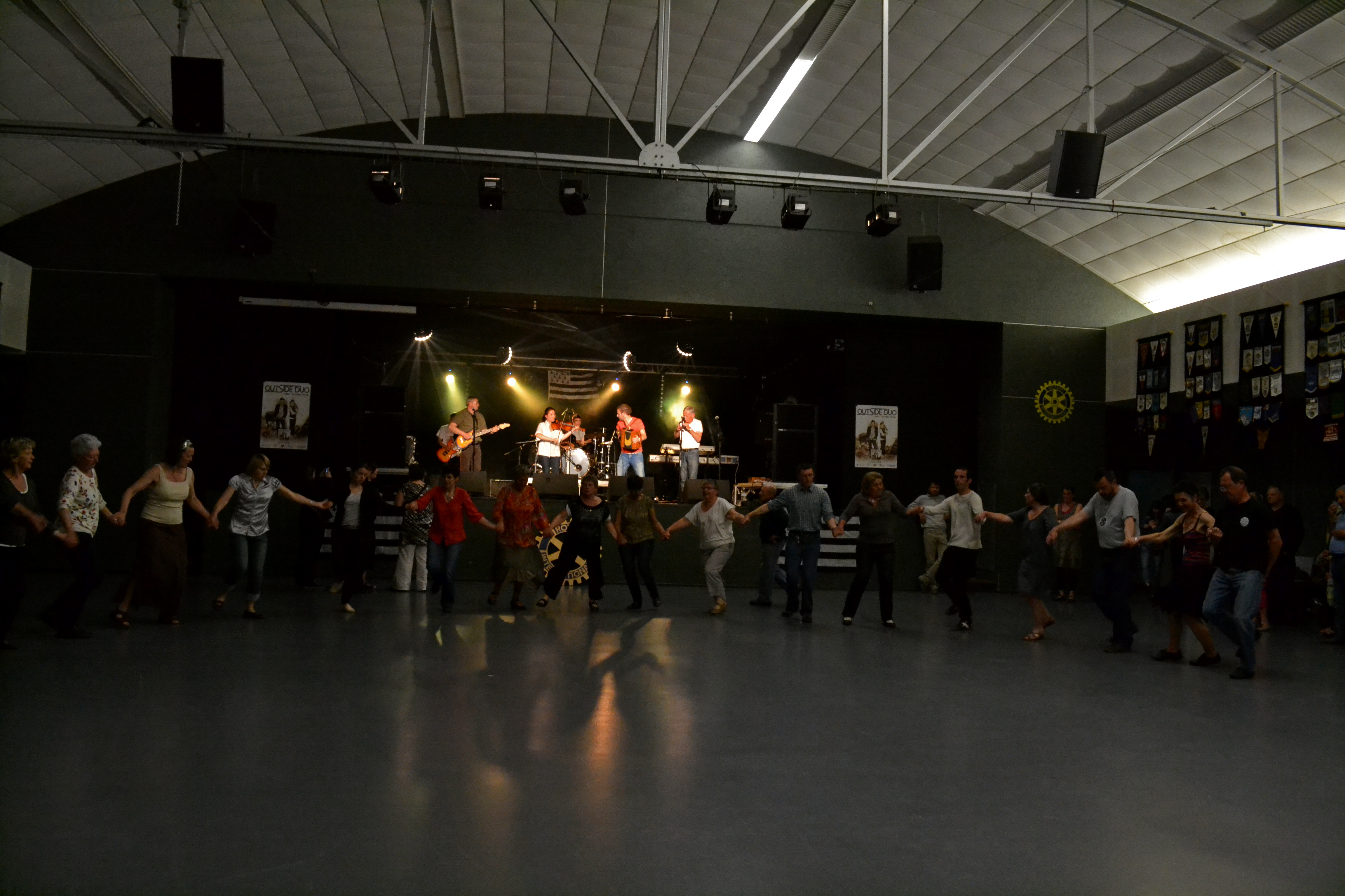 Le groupe de fest-noz Kepelledro a fait danser la salle du Cristal à Plouénan le 1er juin 2013.